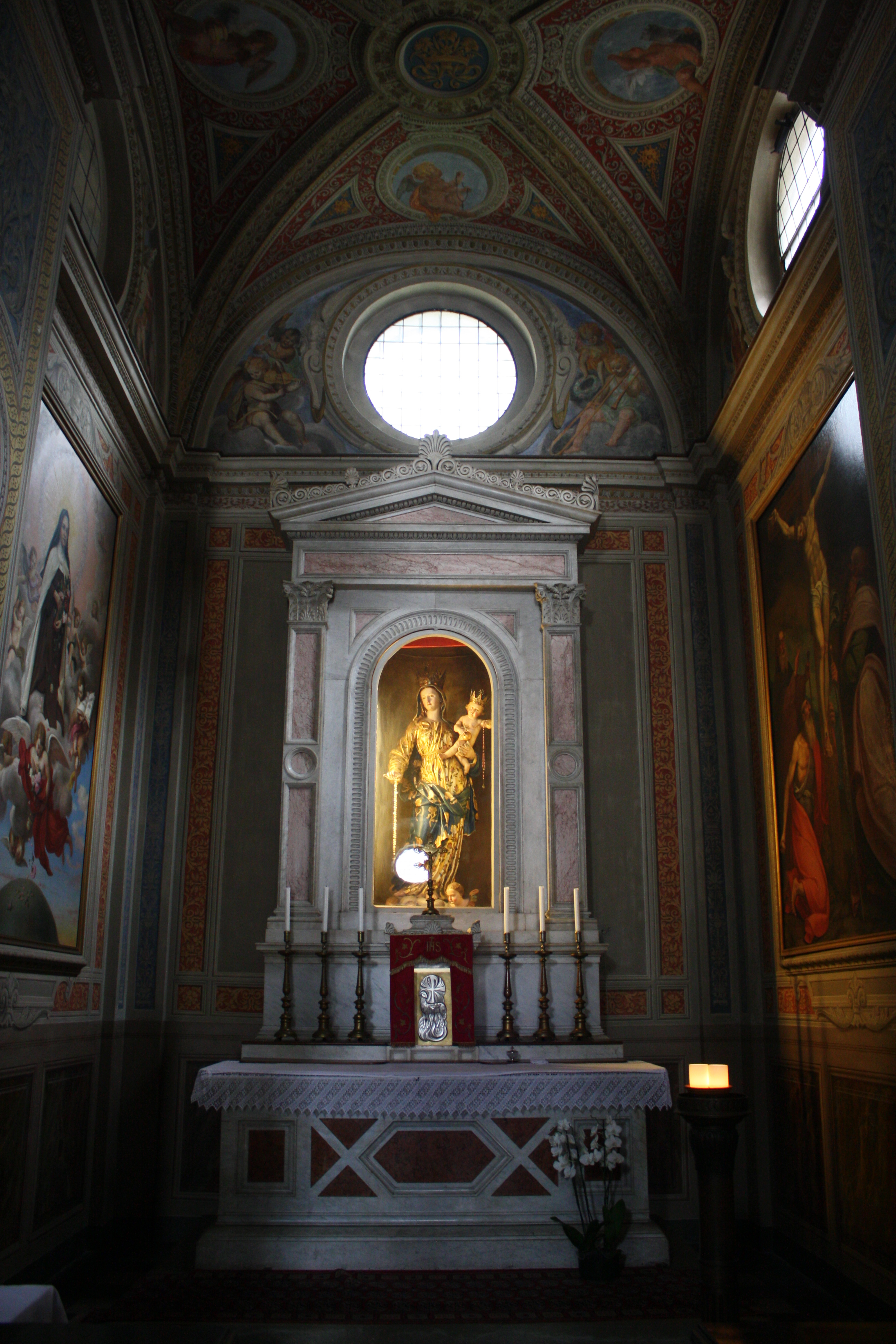 L'interno della chiesa di San Magno a Legnano - Cappella del Santissimo Sacramento.